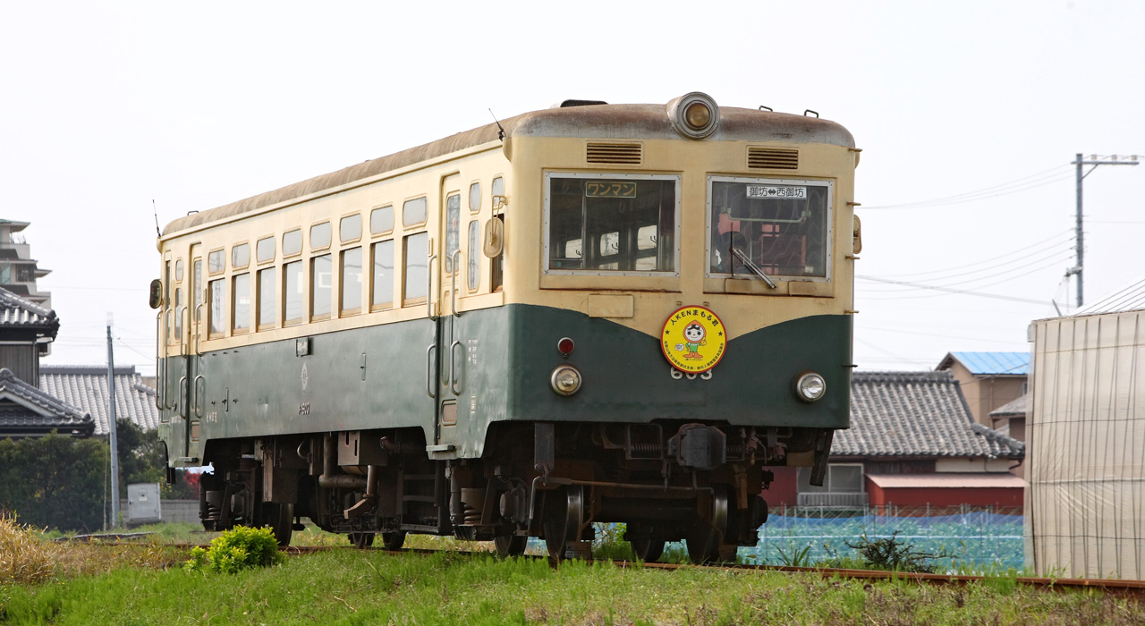 Kishu Railway Kiha 600